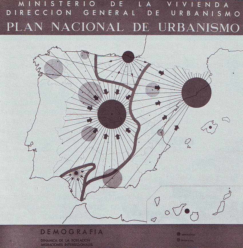 Espainiako Plan Nazionalerako ikerketa demografikoa (1962).